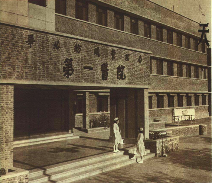 1952 华北纺织管理局第一医院（后天津市第一中心医院）